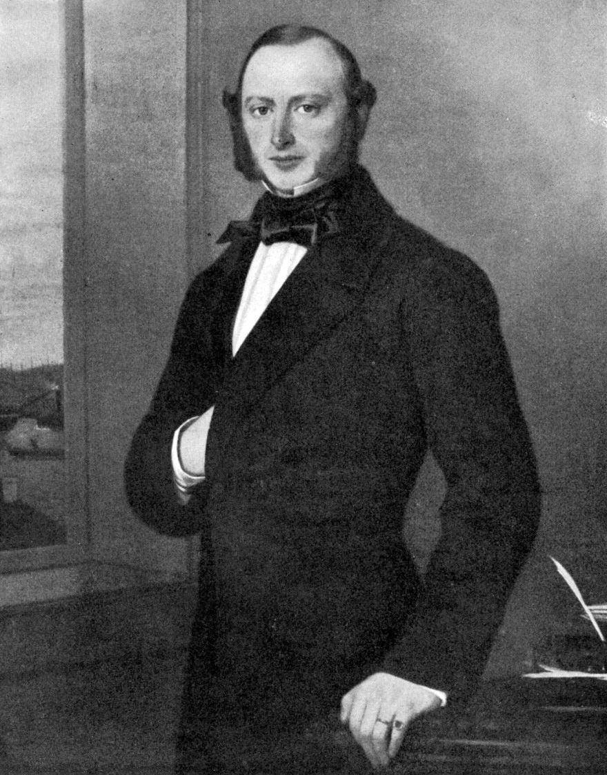 James Dickson (1815–1885). Brun väst och svart bonjour, grågrön fältindelad fondvägg och fönsterutblick över hamn.